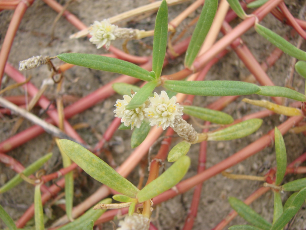 Blutaparon portulacoides - AMARANTHACEAE - Praia do Mo�ambique - Florian�polis - SC - Brasil